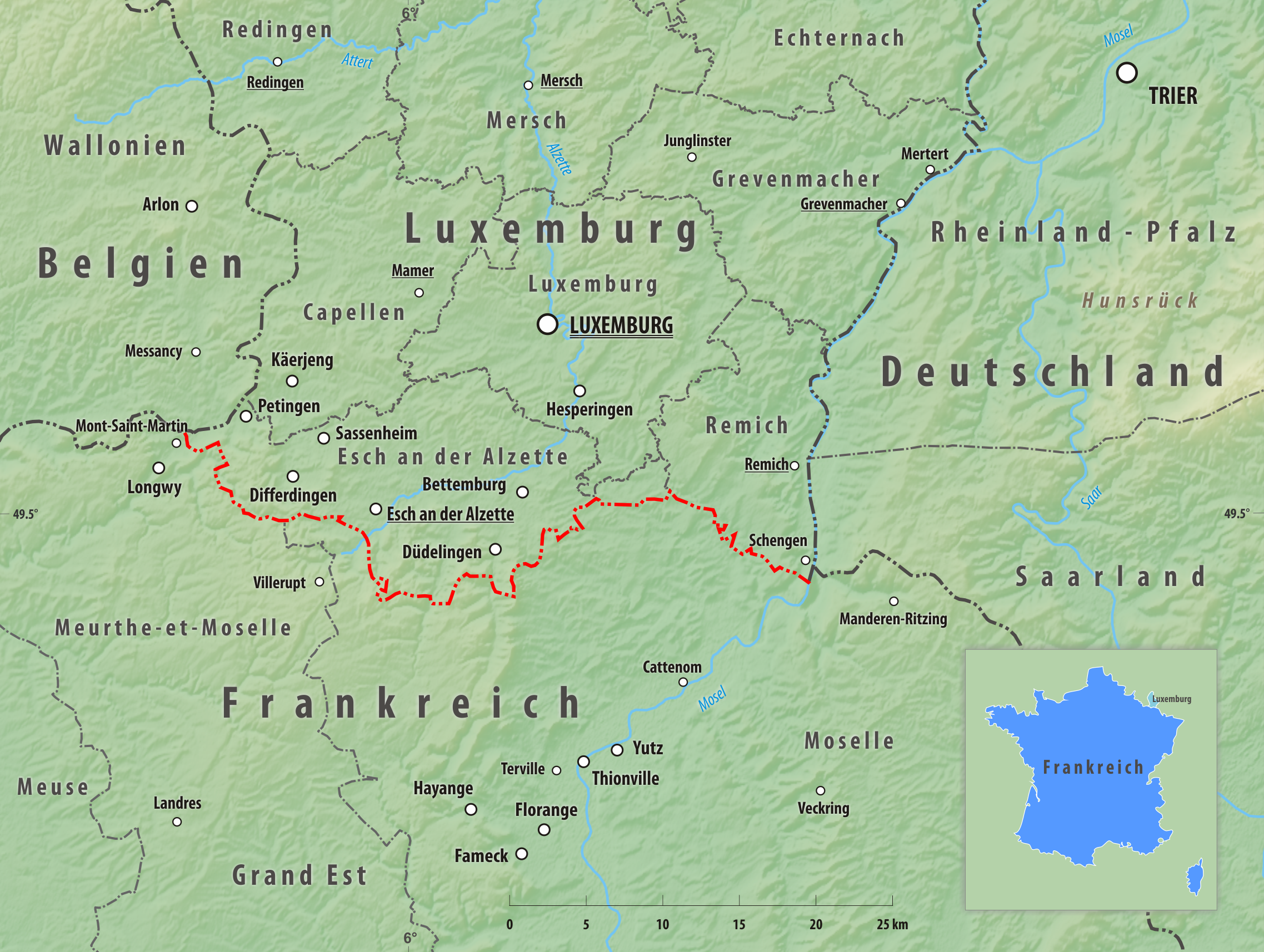 Reliefkarte des Grenzverlaufes zwischen Frankreich und Luxemburg Topographischer Hintergrund: NASA Shuttle Radar Topography Mission (public domain). SRTM3 v.2.